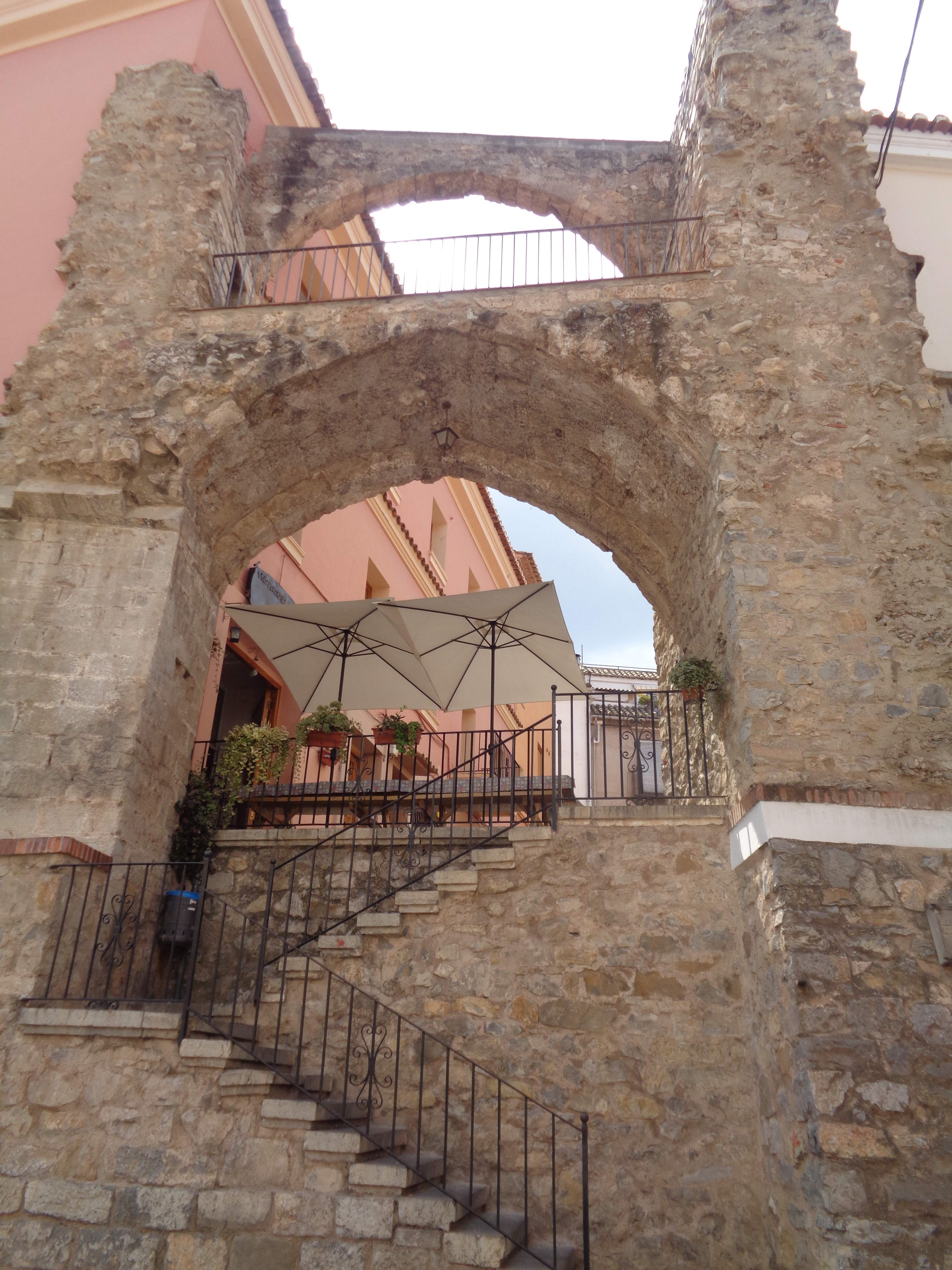 Xèrica. 07.071-006.